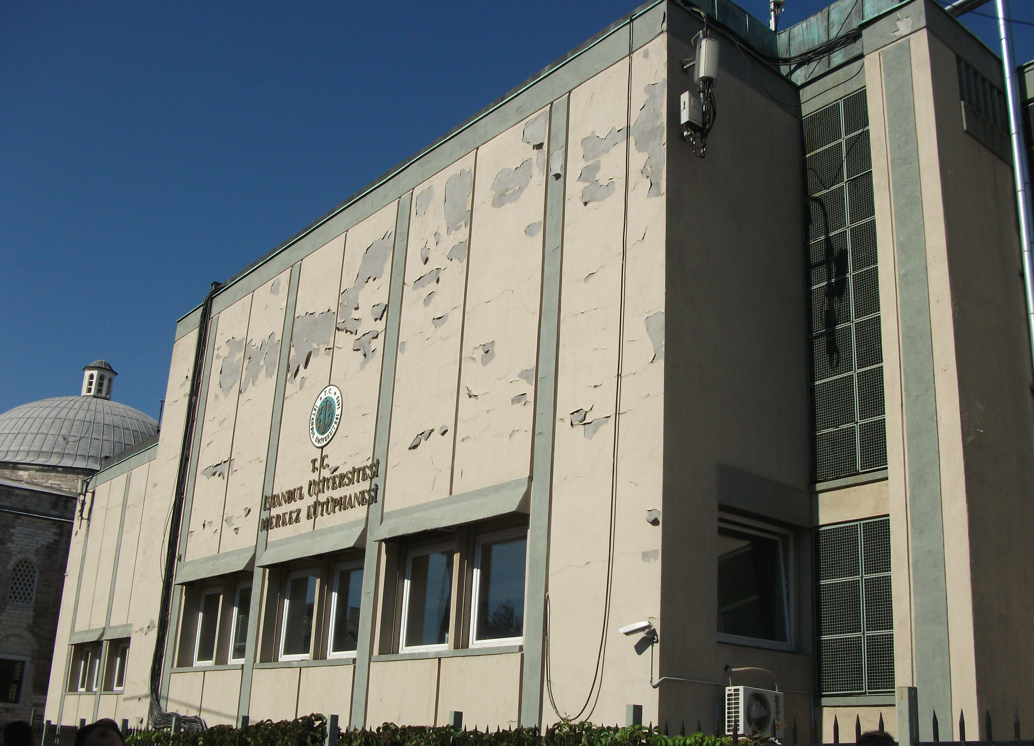 "Türk mimar Hüseyin Başçetinçelik tarafından tasarlanan ve 1970-85 yılları arasında İstanbul'un Laleli ile Beyazıt semtleri arasında inşa edilen İstanbul Üniversitesi Merkez Kütüphanesi."